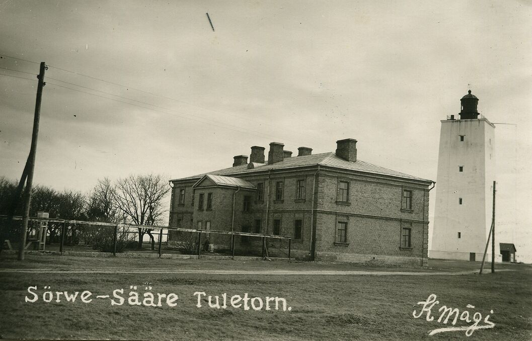 1770 ehitatud Sääre majakas ja 19. sajandi lõpuks valminud kasarmuhoone